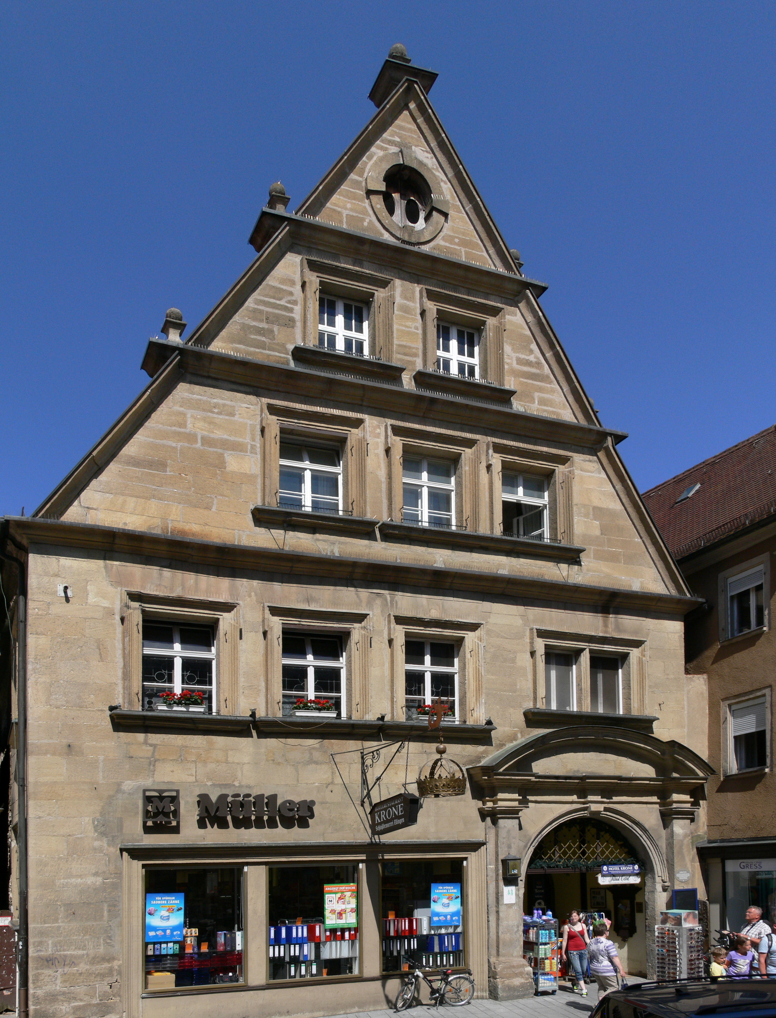 Denkmalgeschütztes Gebäude in Weißenburg (Bayern), Hotel Krone, Rosenstraße 10